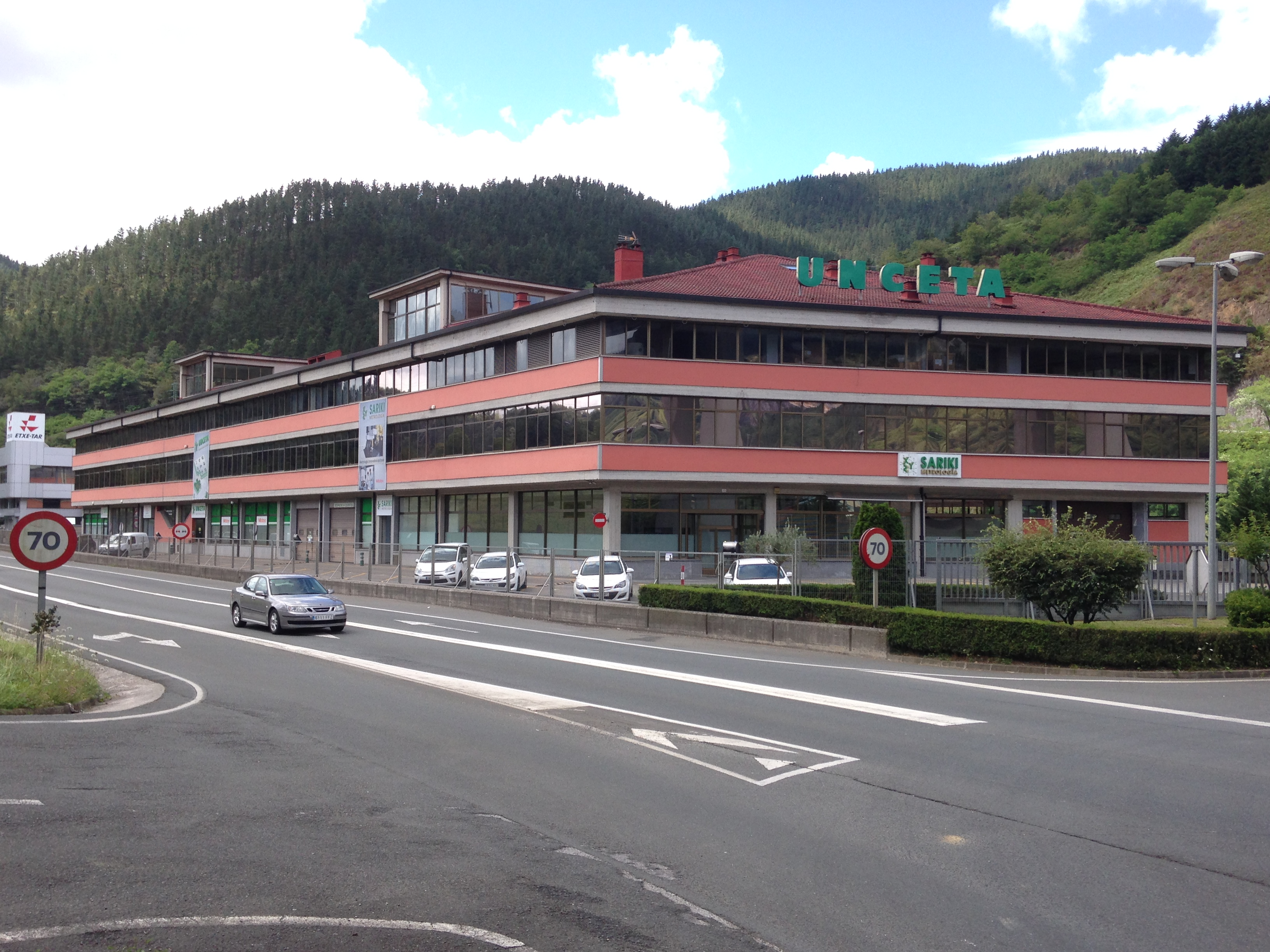 Vista general de la sede central de la empresa Ferretería Unceta en Elgoibar, Gipuzkoa, País Vasco España.